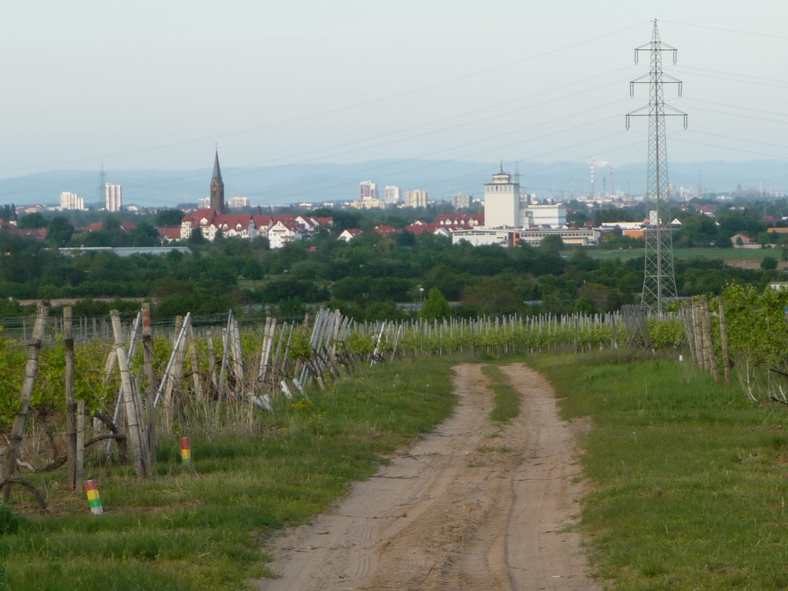 Lambsheim